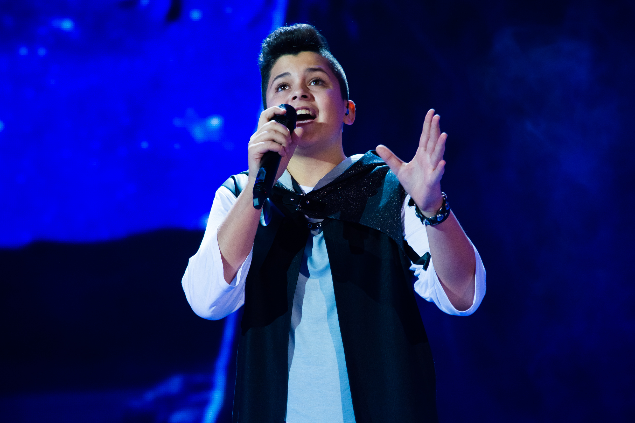 Руслан Асланов на сцене Детского Евровидения 2015 («Армеец», София) во время генеральной репетиции